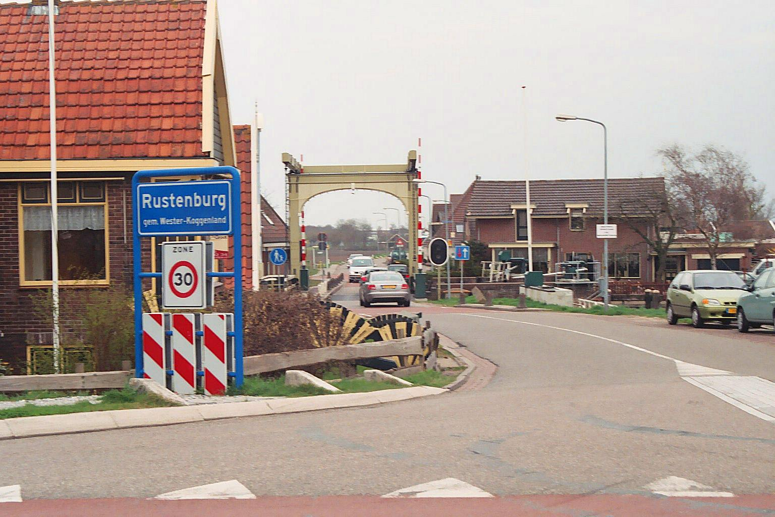 Rustenburg, The Netherlands